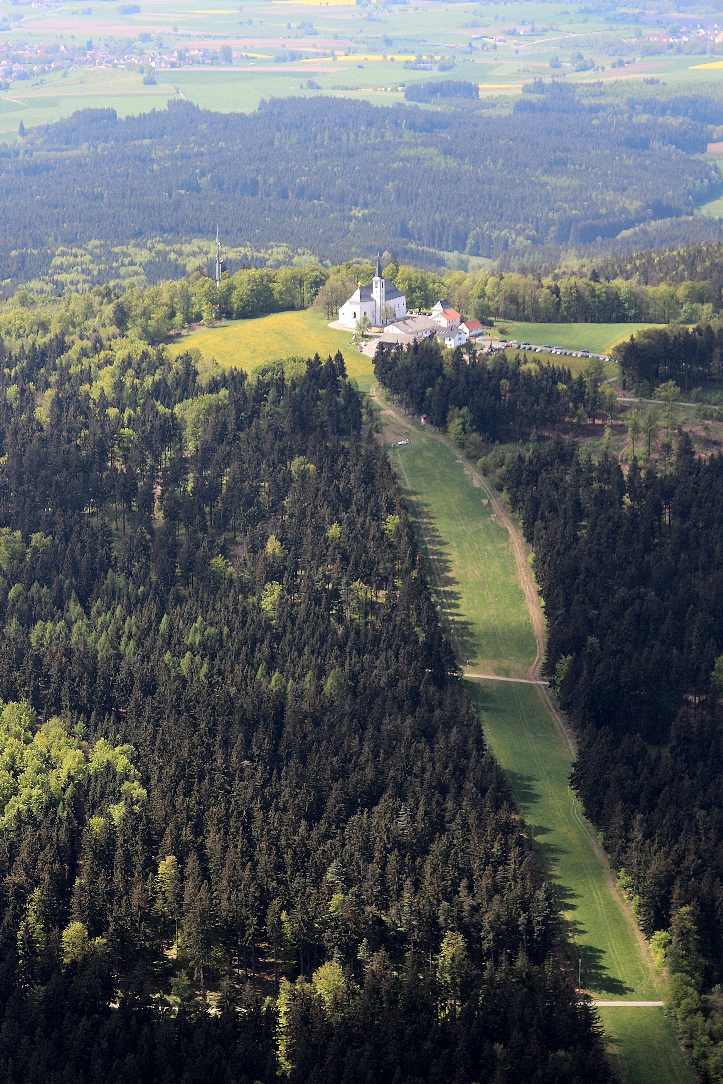 Fahrenberg bei Waldthurn mit der Wallfahrtskirche "Mariä Heimsuchung", Landkreis Neustadt an der Waldnaab, Oberpfalz, Bayern (2014). Im Vordergrund ist das Gelände des Skiliftes Fahrenberg zu sehen.